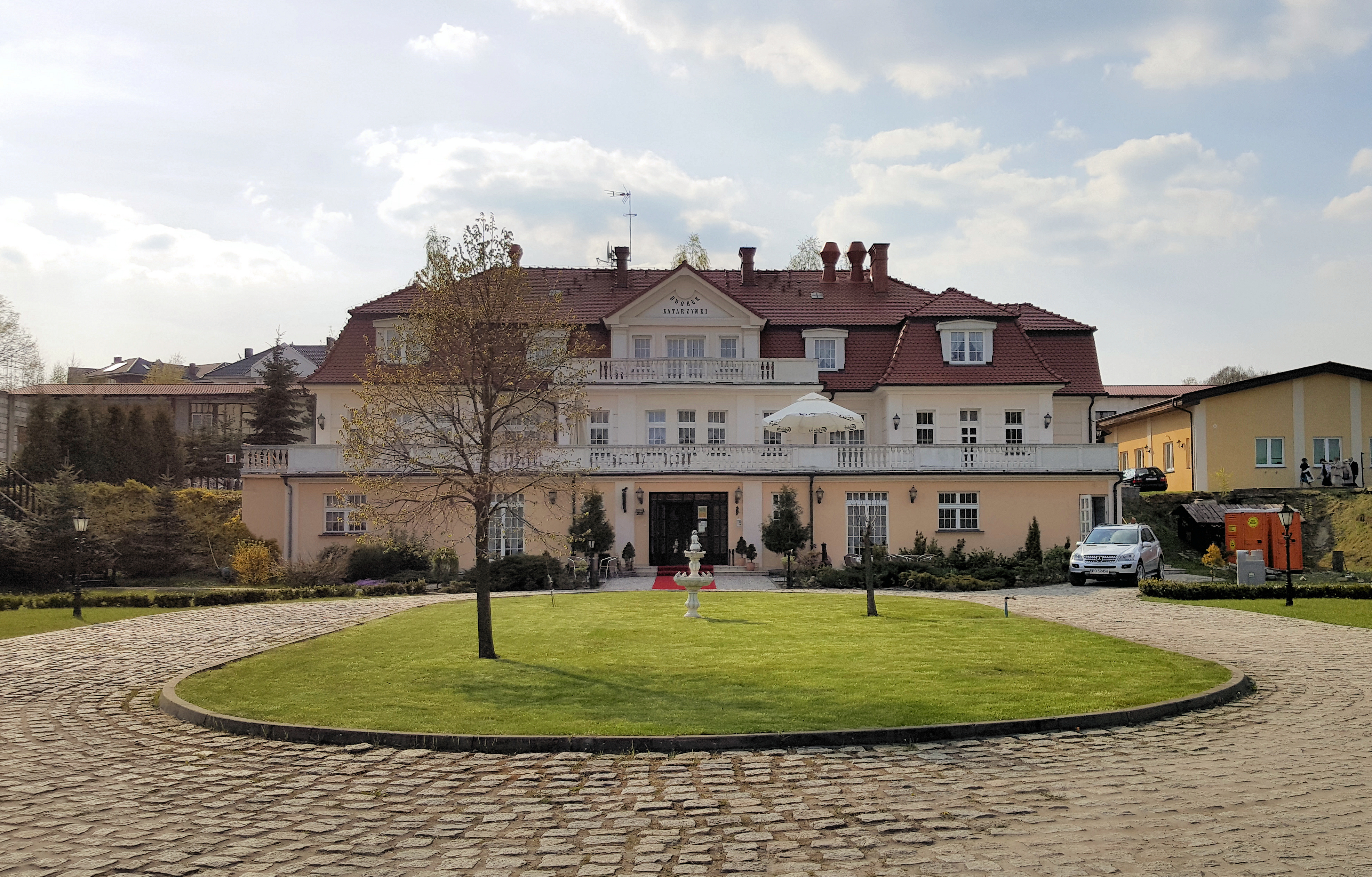 Dworek, Katarzynki, gmina Swarzędz, Polska